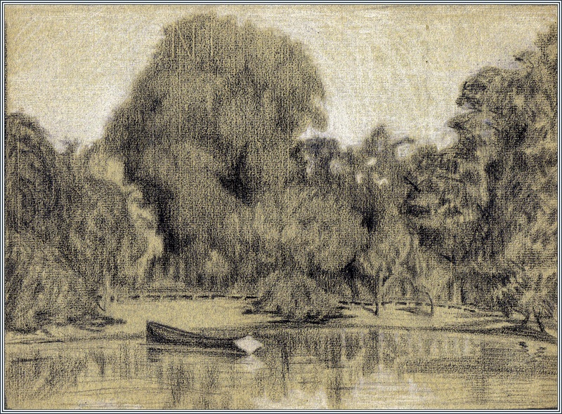 Jean Lebedeff, "Paysage", 1908.